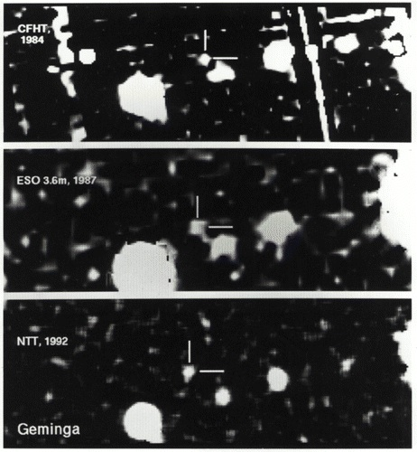 Alla ricerca della controparte ottica - 1